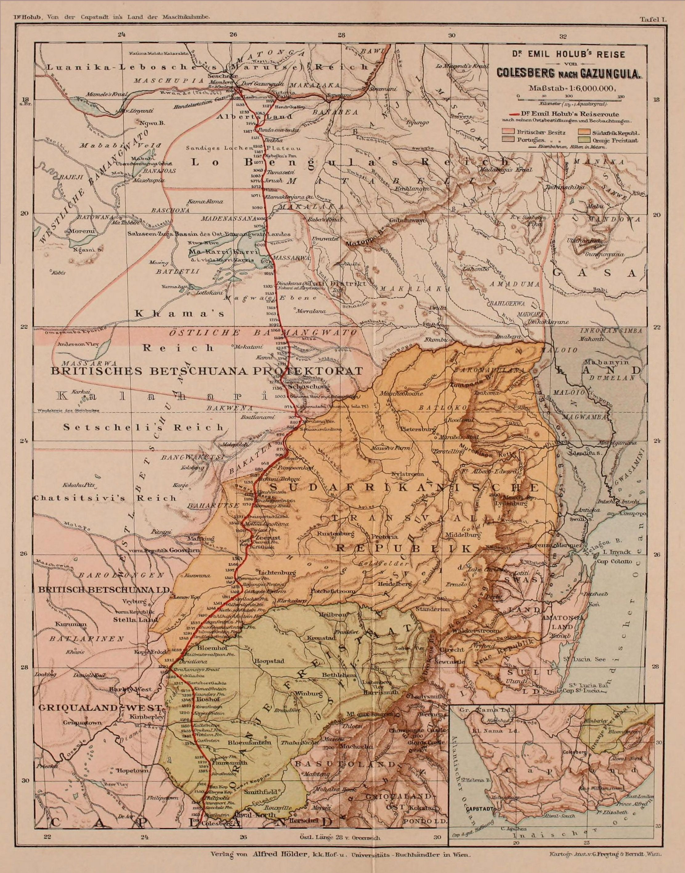 Emil Holub (Holice, 1847. október 7. – Bécs, 1902. február 21.), cseh orvos, utazó, Afrika-felfedező, író, néprajzi gyűjtő 1883– 1887-es dél-afrikai expedíciójáról készült térkép